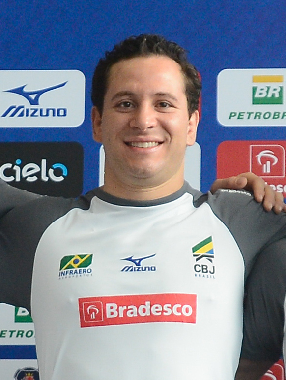 Rio de Janeiro - Equipe masculina convocada pela Confederação Brasileira de Judô (CBJ) para disputar os Jogos Olímpicos Rio 2016, posa para fotos (Tânia Rêgo/Agência Brasil)